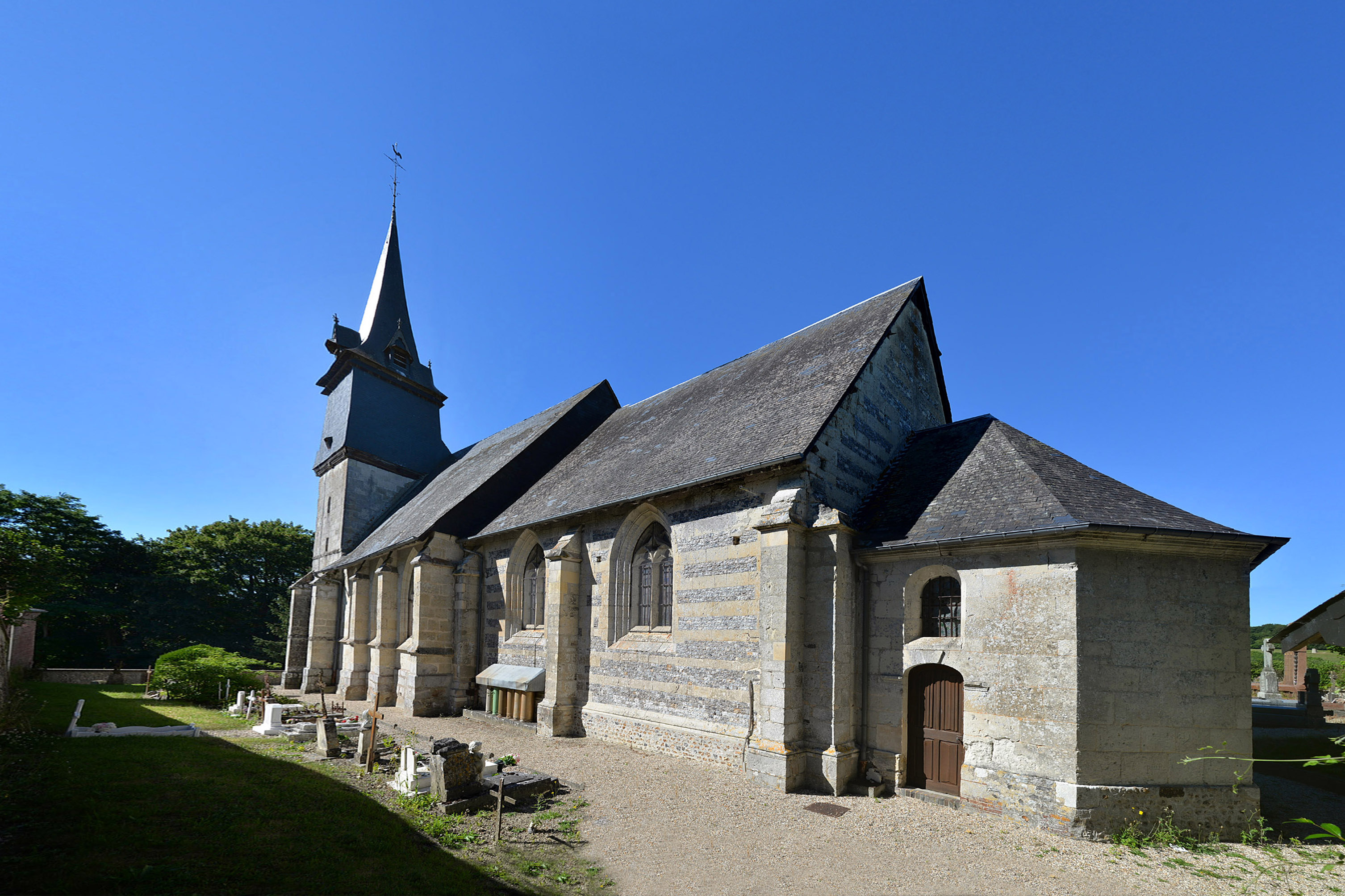 Saint-Martin-de-Bienfaite-la-Cressonnière (Calavados)